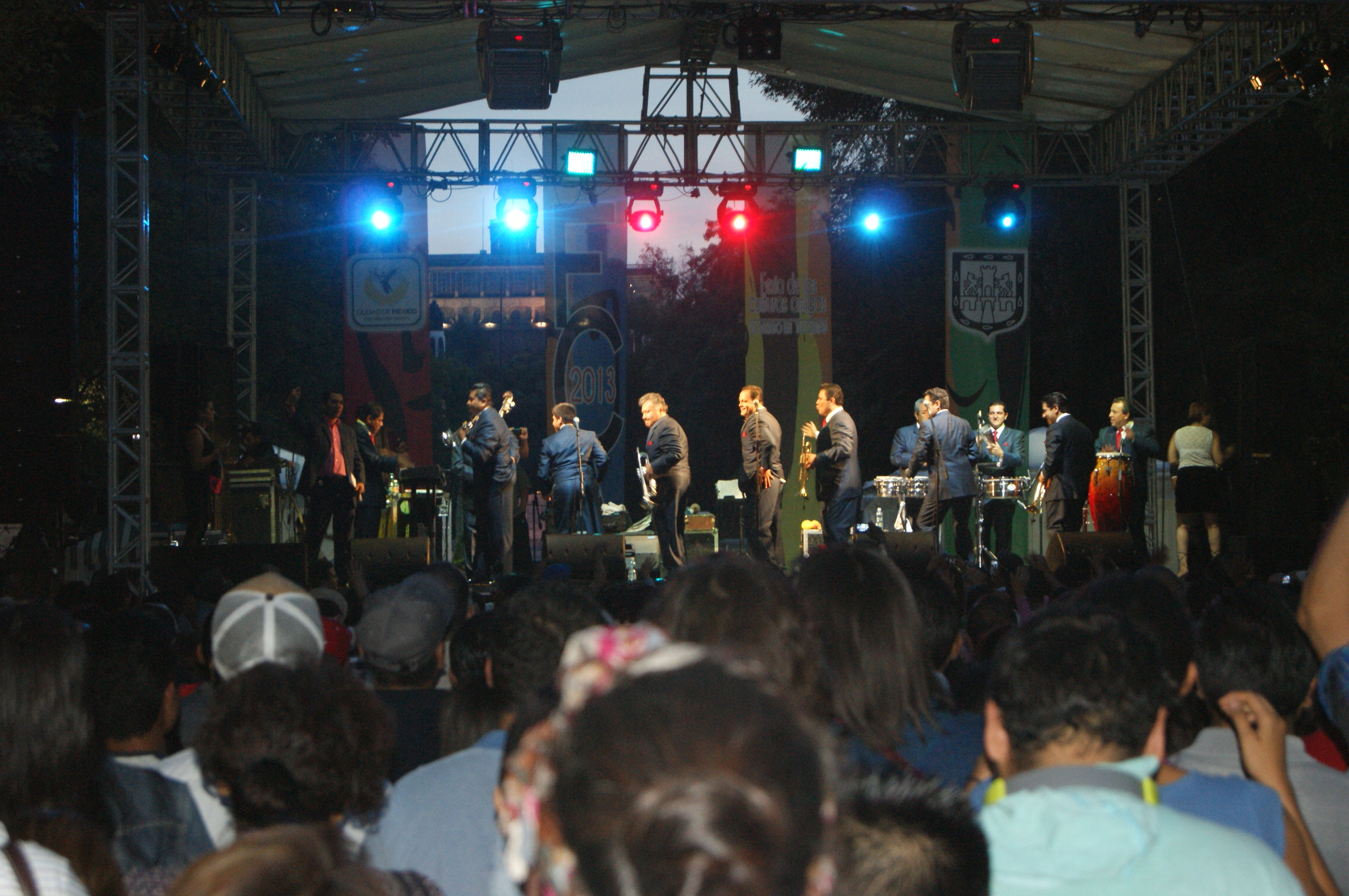 Feria de de las Culturas Amigas Ciudad de México, DF, 2013